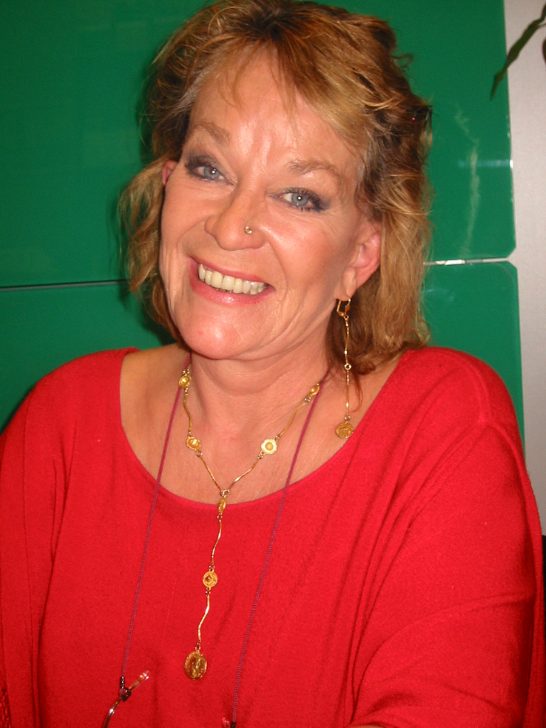 Anna Wahlgren auf der Buchmesse 2006 in Frankfurt/Main (am Stand der Frankfurter Rundschau)